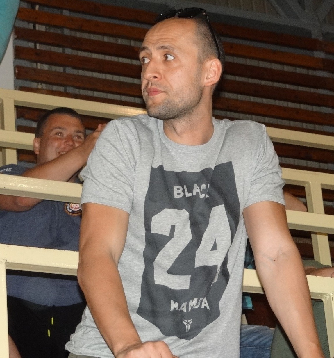 Kamil Piechucki